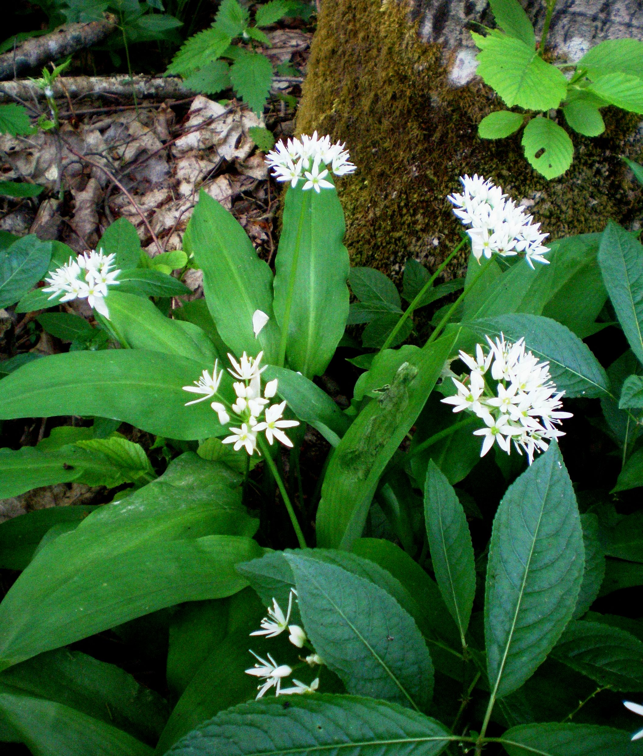 Meškinis česnakas (Allium ursinum) Smilgos kraštovaizdžio draustinyje, Kėdainių raj.